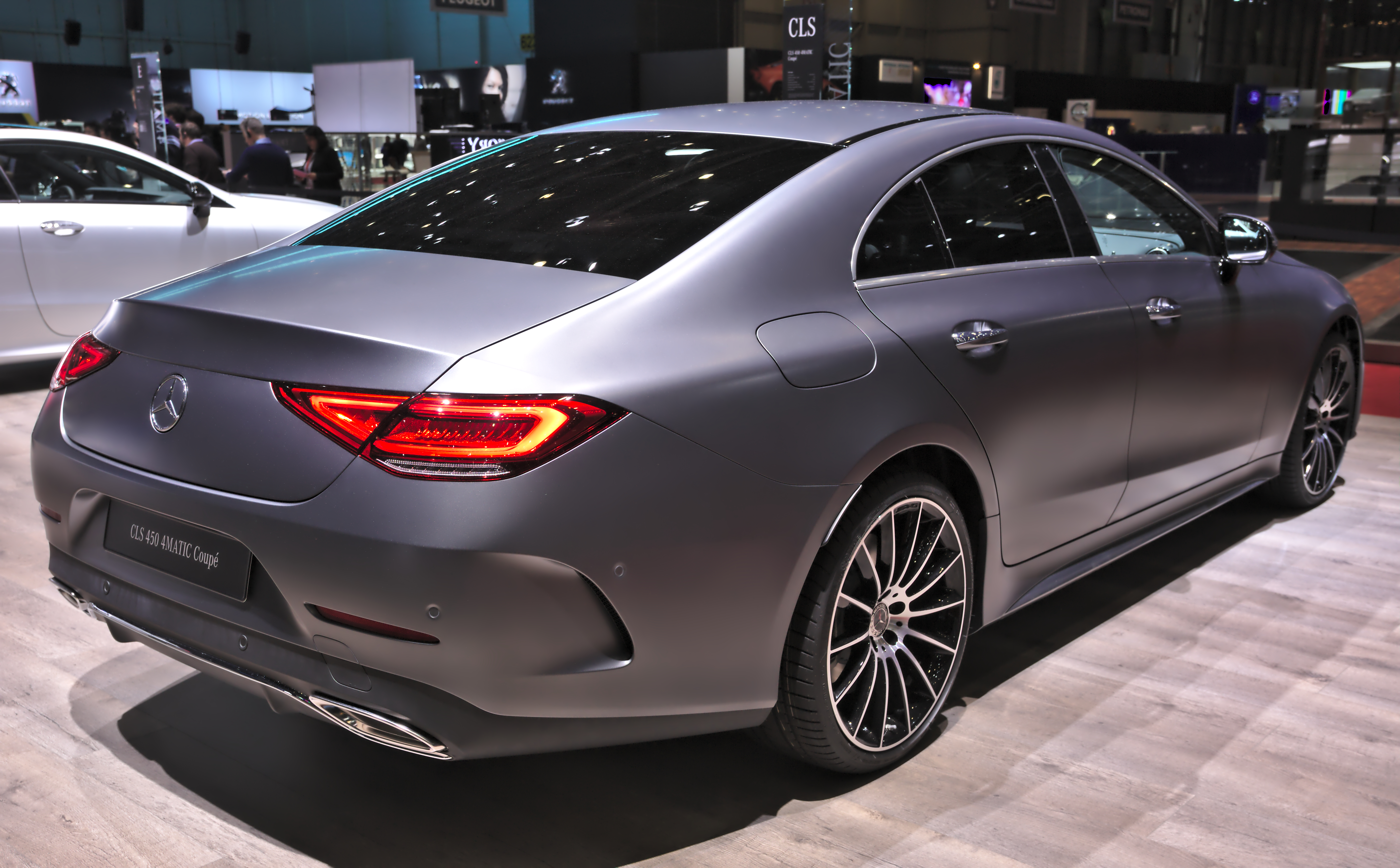 Mercedes-Benz CLS 450 4Matic at Geneva Motorshow 2018